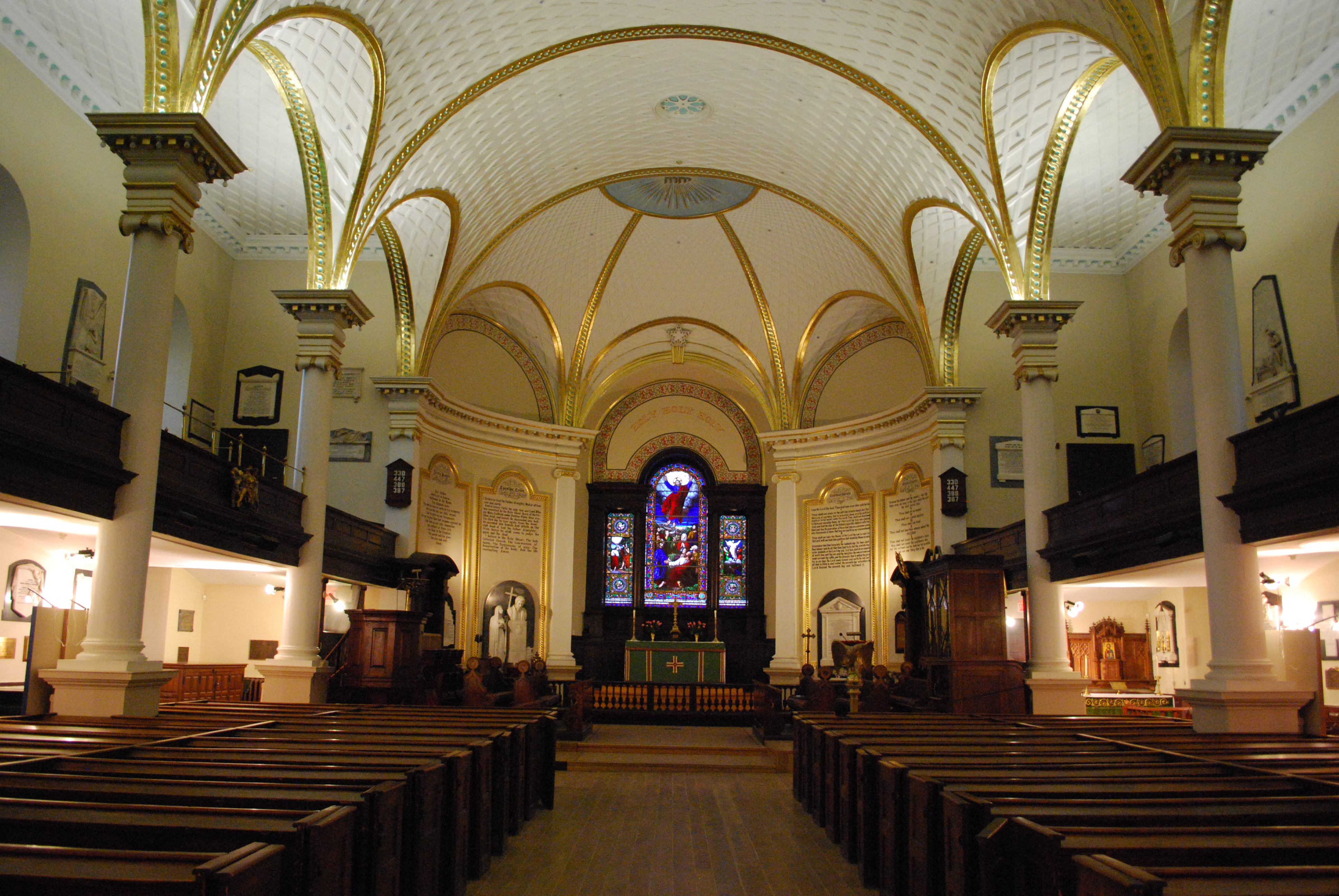 Intérieur de la cathédrale anglicane de la Sainte-Trinité à Québec.